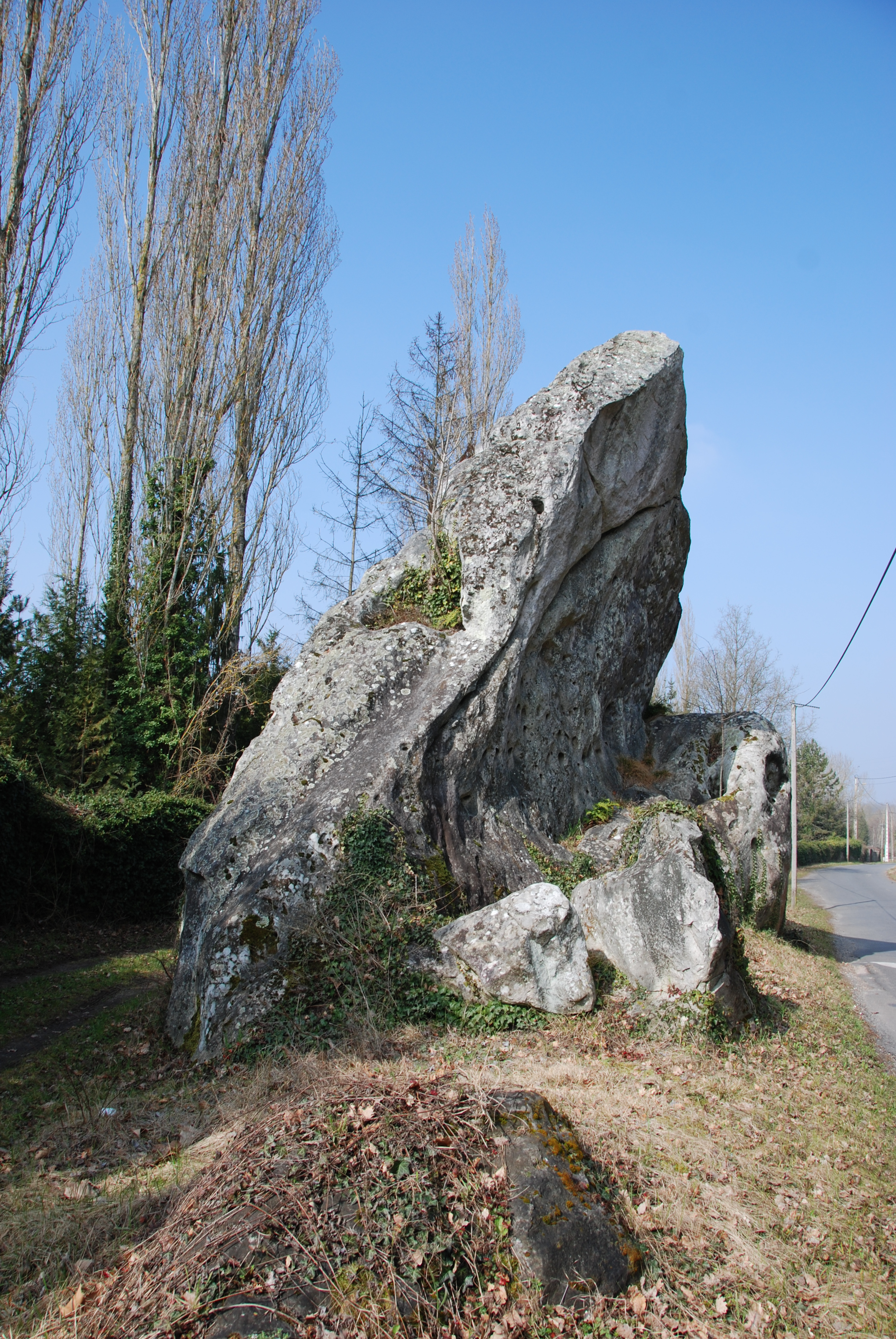 Rocher dit Pierre Longue